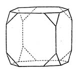 Tesserale Kombination Würfel mit Oktaeder